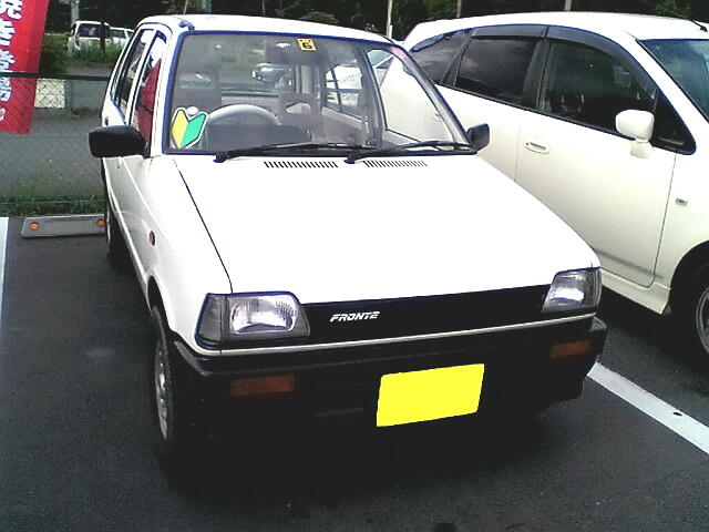 スズキ・フロンテ（6代目・後期型）